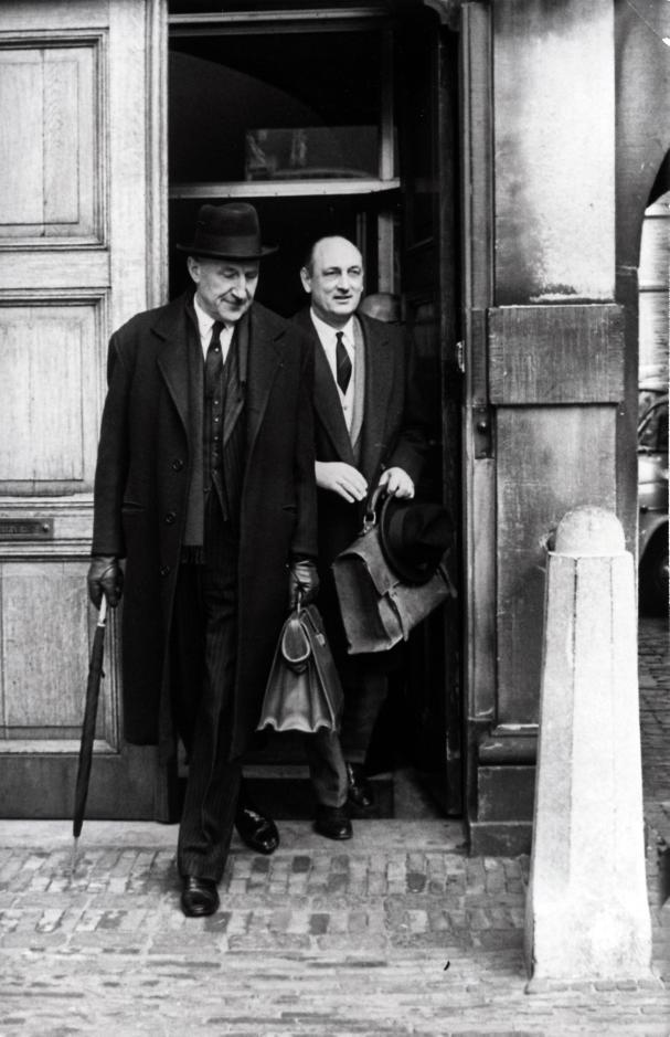 Minister van Binnenlandse Zaken E.H. Toxopeus en Minister J. Luns. Den Haag, Nederland, 5 maart 1965.